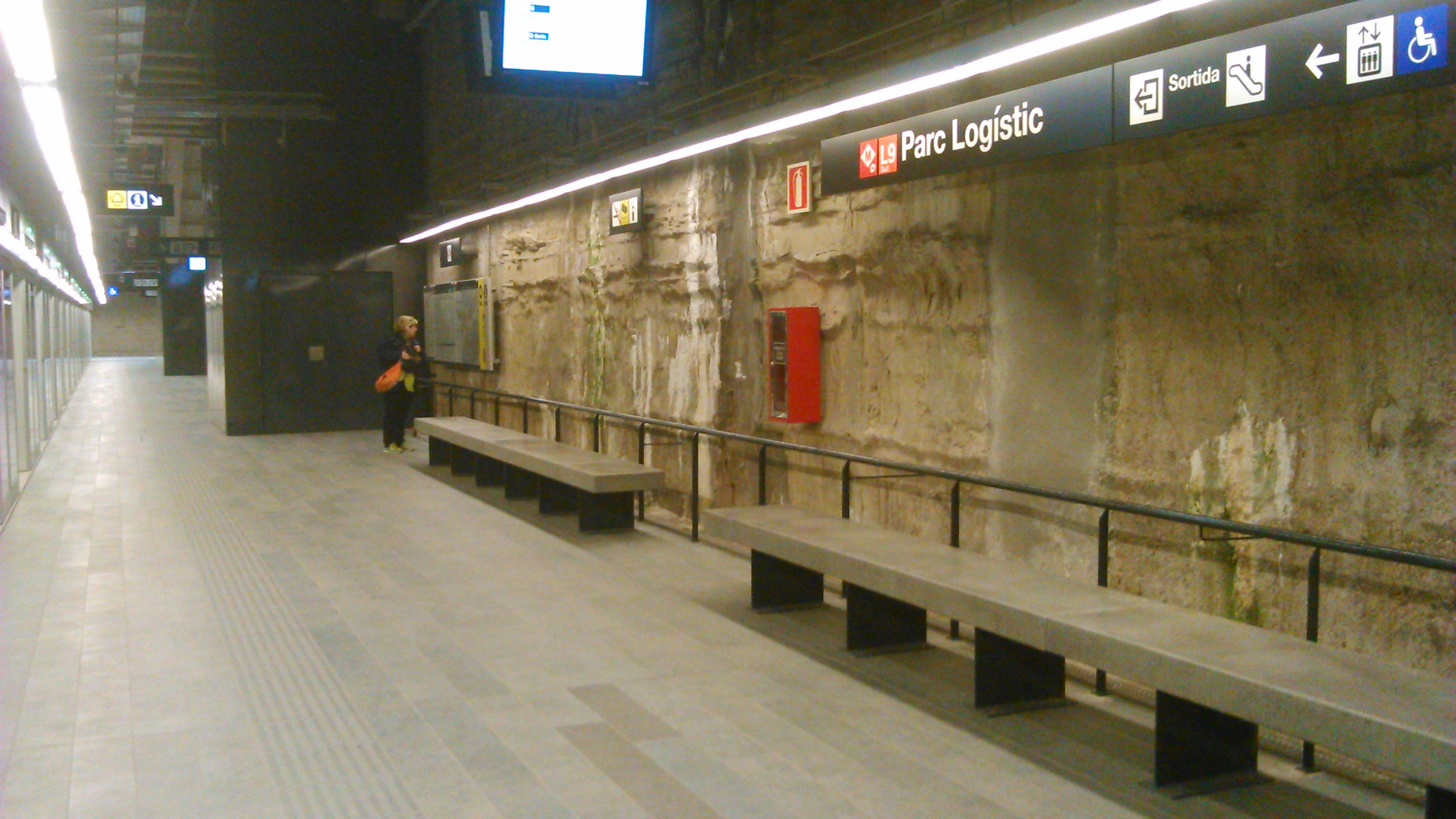 Estació de Parc Logístic.